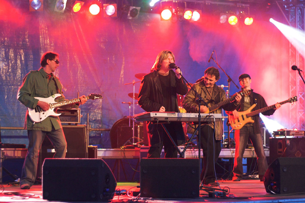 Universe na koncercie pod Warszawą, czerwiec 2006